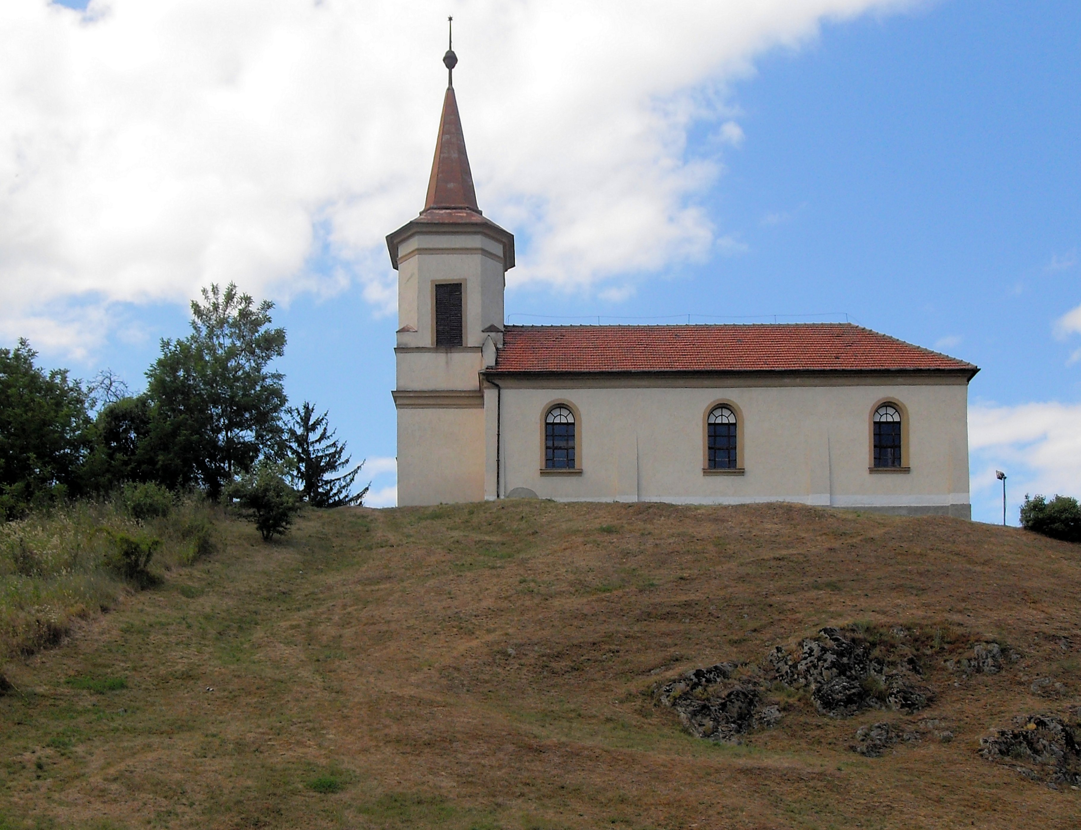 Református templom Meszes